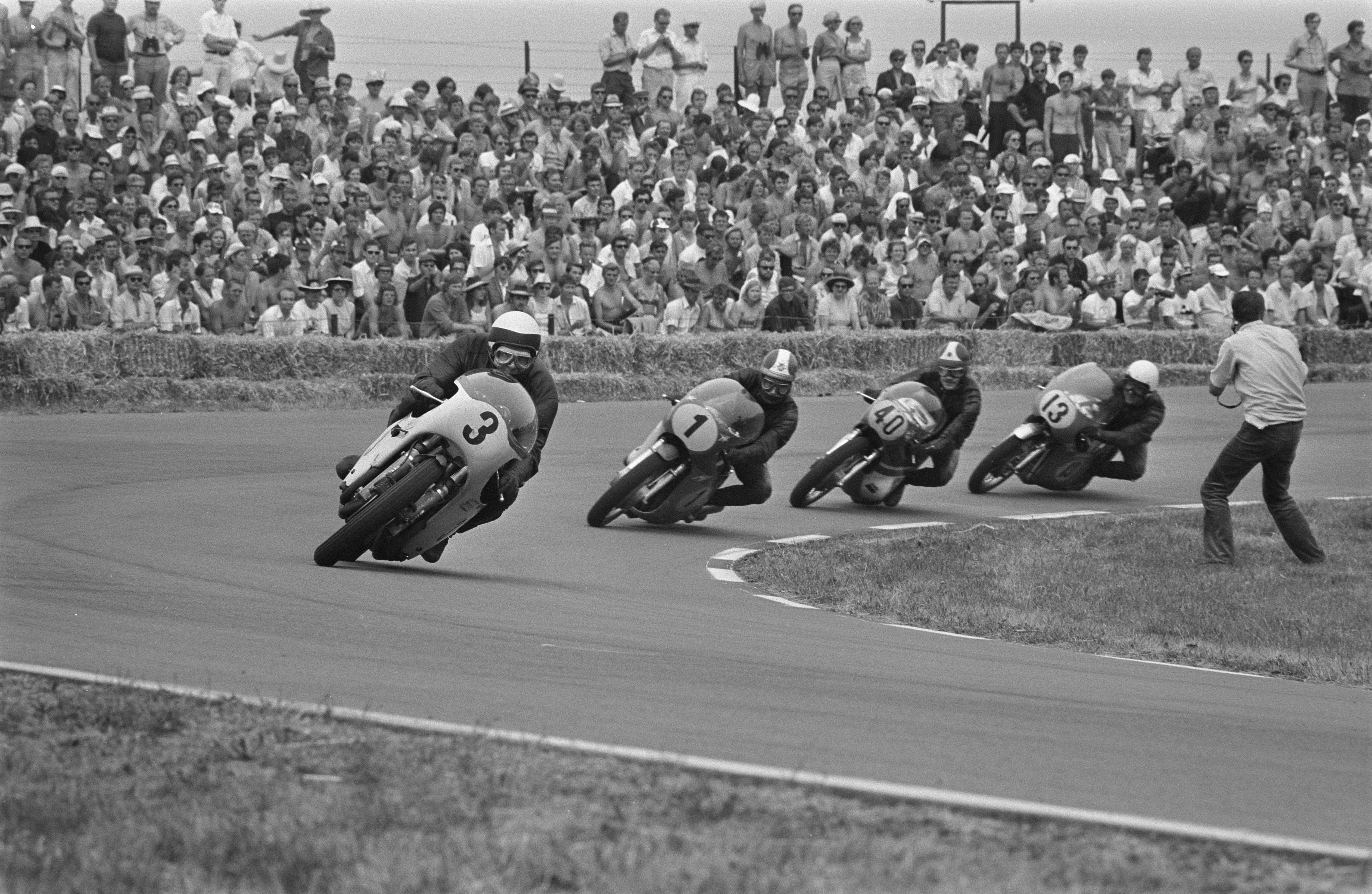 Collectie / Archief : Fotocollectie Anefo Reportage / Serie : TT Assen 1970 Beschrijving : Race in de 500 cc klasse, v.l.n.r. : Karl Hoppe (Duitsland), Giacomo Agostini (Italië), John Williams (GB) en Paul Smart (GB) Datum : 27 juni 1970 Locatie : Assen, Drenthe Trefwoorden : motorfietsen, motorraces, motorsport Persoonsnaam : Agostini, Giacomo, Hoppe, Karl, Smart, Paul, Williams, John Fotograaf : Fotograaf Onbekend / Anefo, [onbekend] Auteursrechthebbende : Nationaal Archief Materiaalsoort : Negatief (zwart/wit) Nummer archiefinventaris : bekijk toegang 2.24.01.05 Bestanddeelnummer : 923-6294